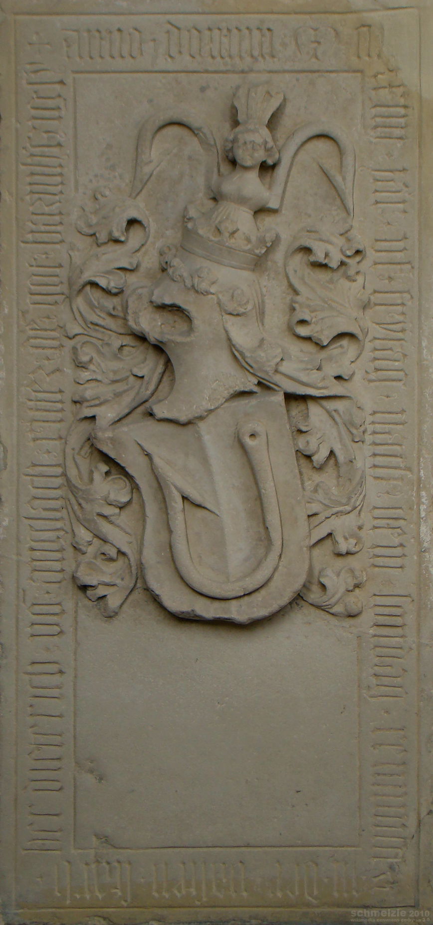 Grabplatte eines Herrn von Angelach in der Alexanderkirche in Marbach am Neckar